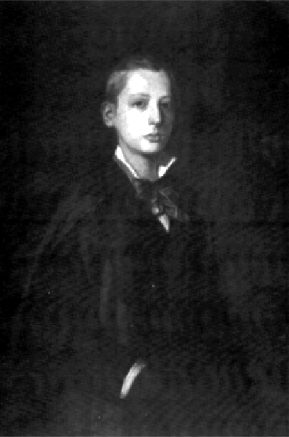 Oleo del pintor Francisco Lameyer y Berenguer, representando a su sobrino de 16 años José Lameyer González.